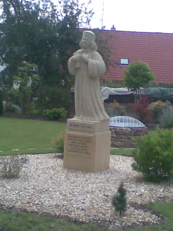 Fotografie sochy Jana Husa na Dobré Vodě u Českých Budějovic